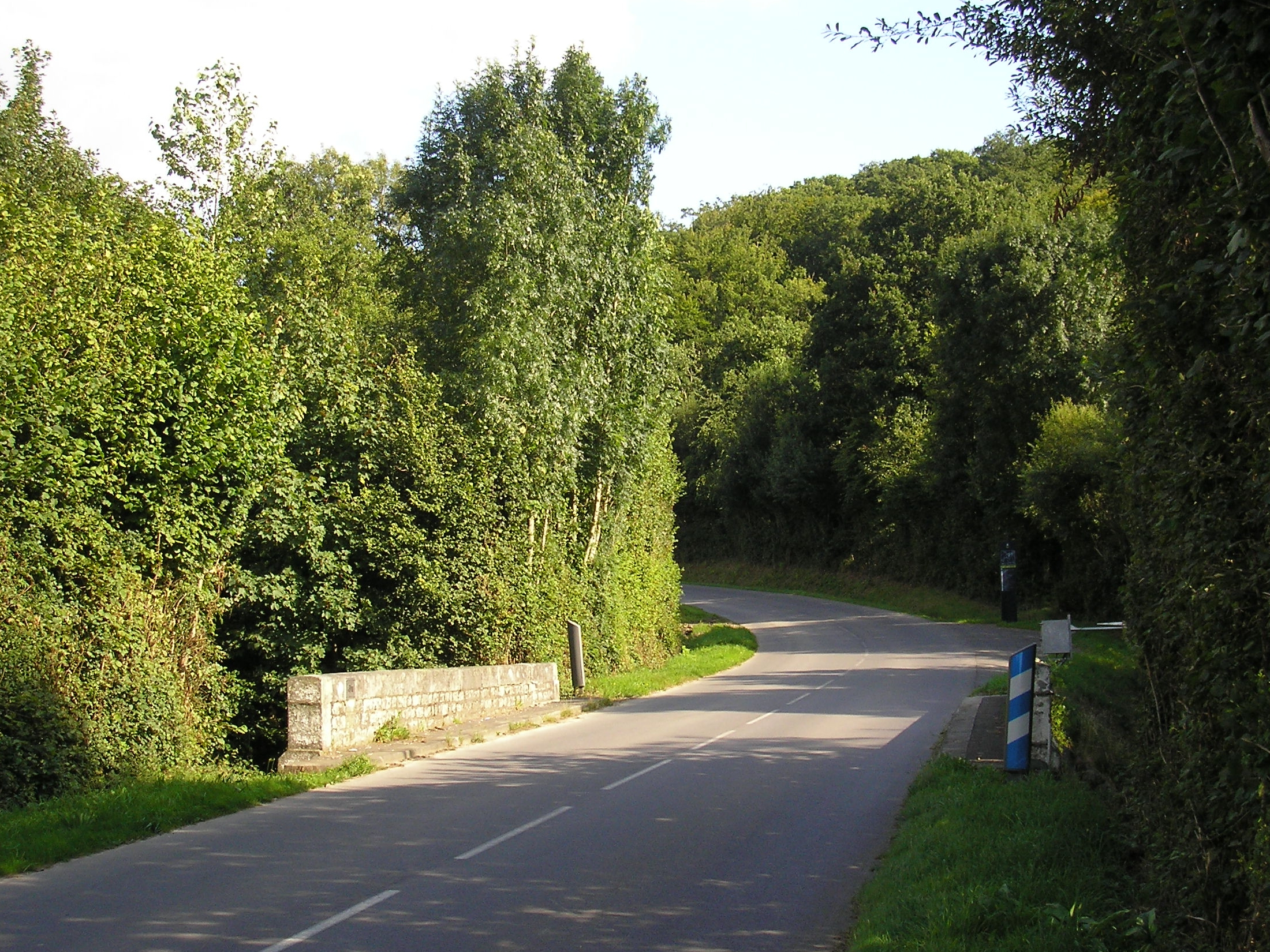 Le pont du Taureau, à la limite des communes de la Ferrière-Harang et Carville (Normandie, France) ; lieu d'action de l'opération Bluecoat, sur la Souleuvre.